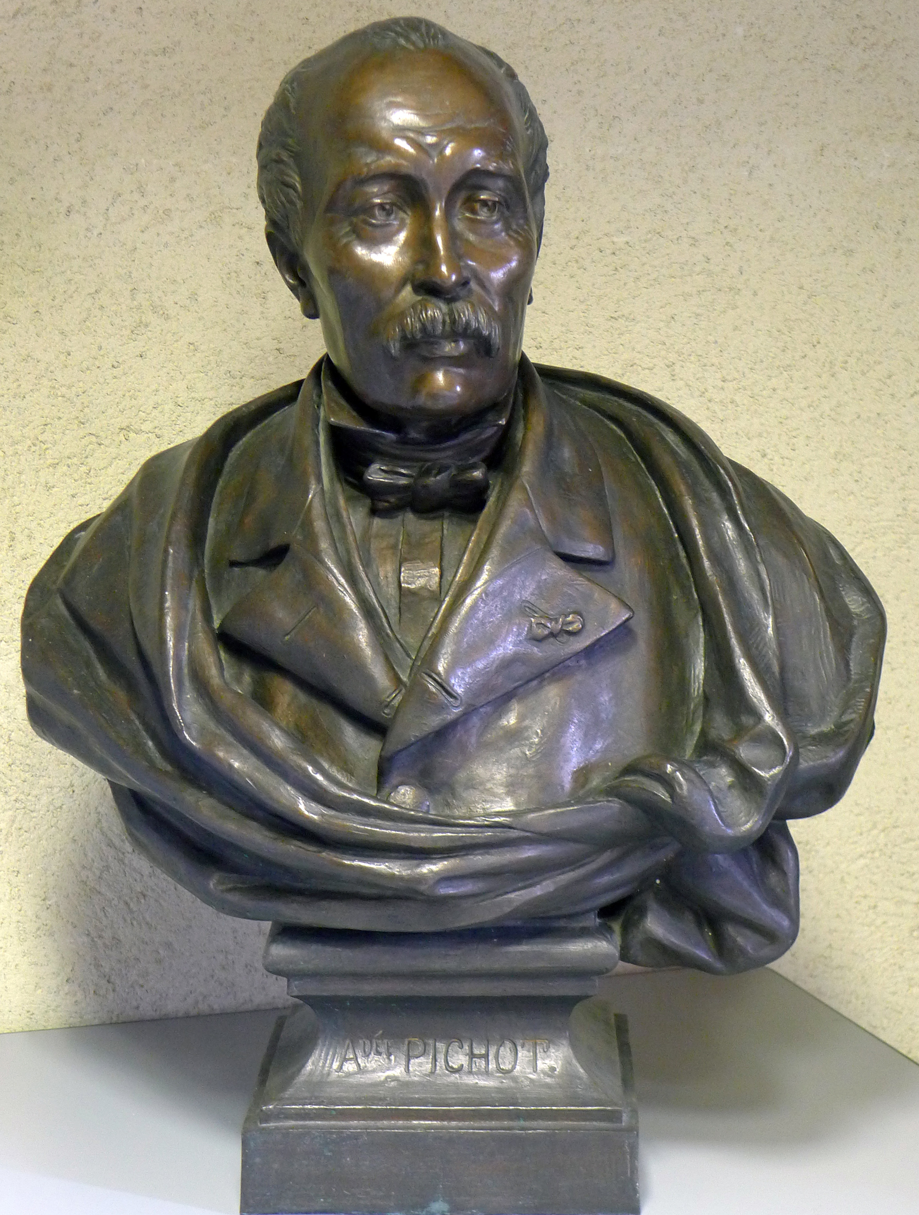 Buste d'Amédée Pichot exposé à la médiathèque d'Arles